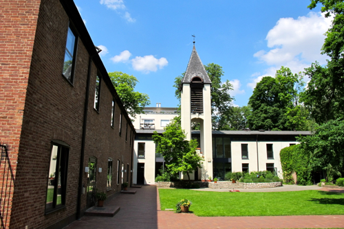 Schwedische Victoria-Gemeinde, Landhausstrasse, Berlin-Wilmersdorf